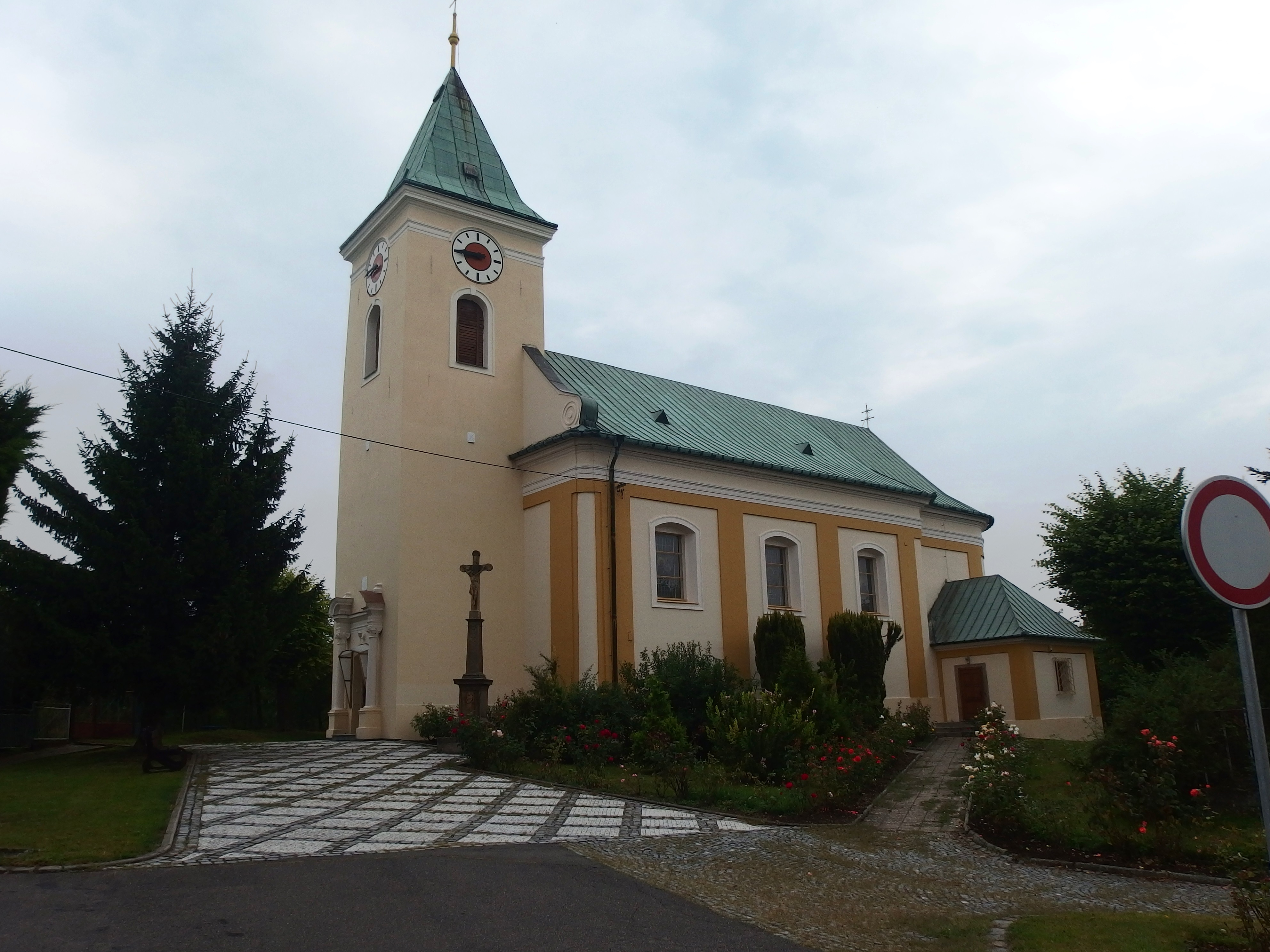 Kostel svatých Petra a Pavla, Kostelec u Holešova.